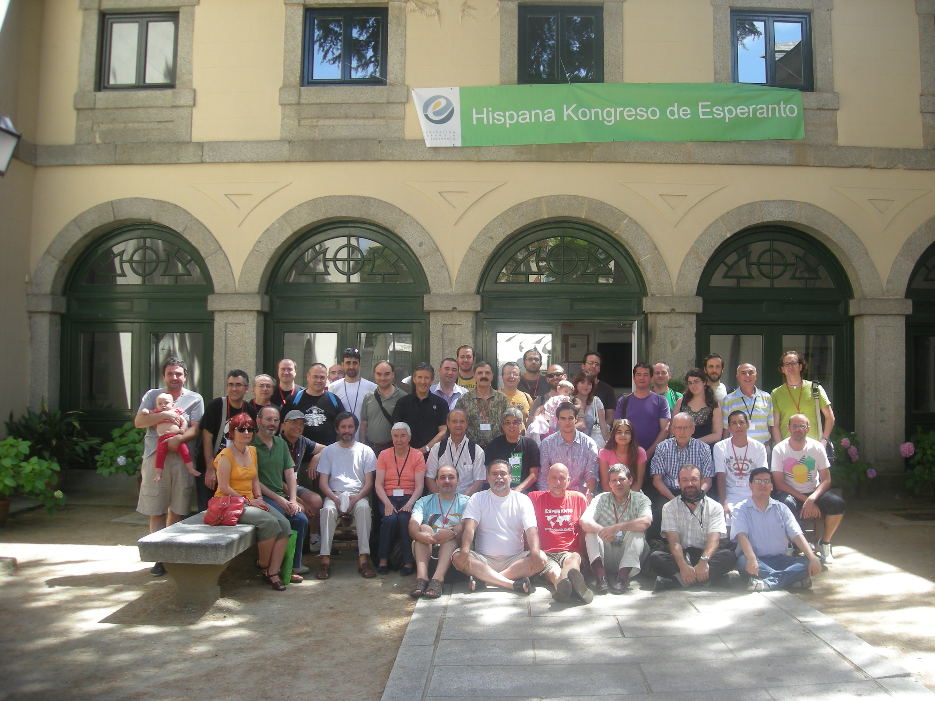 Grupa foto de kongresanoj de la 70-a Hispana Kongreso de Esperanto